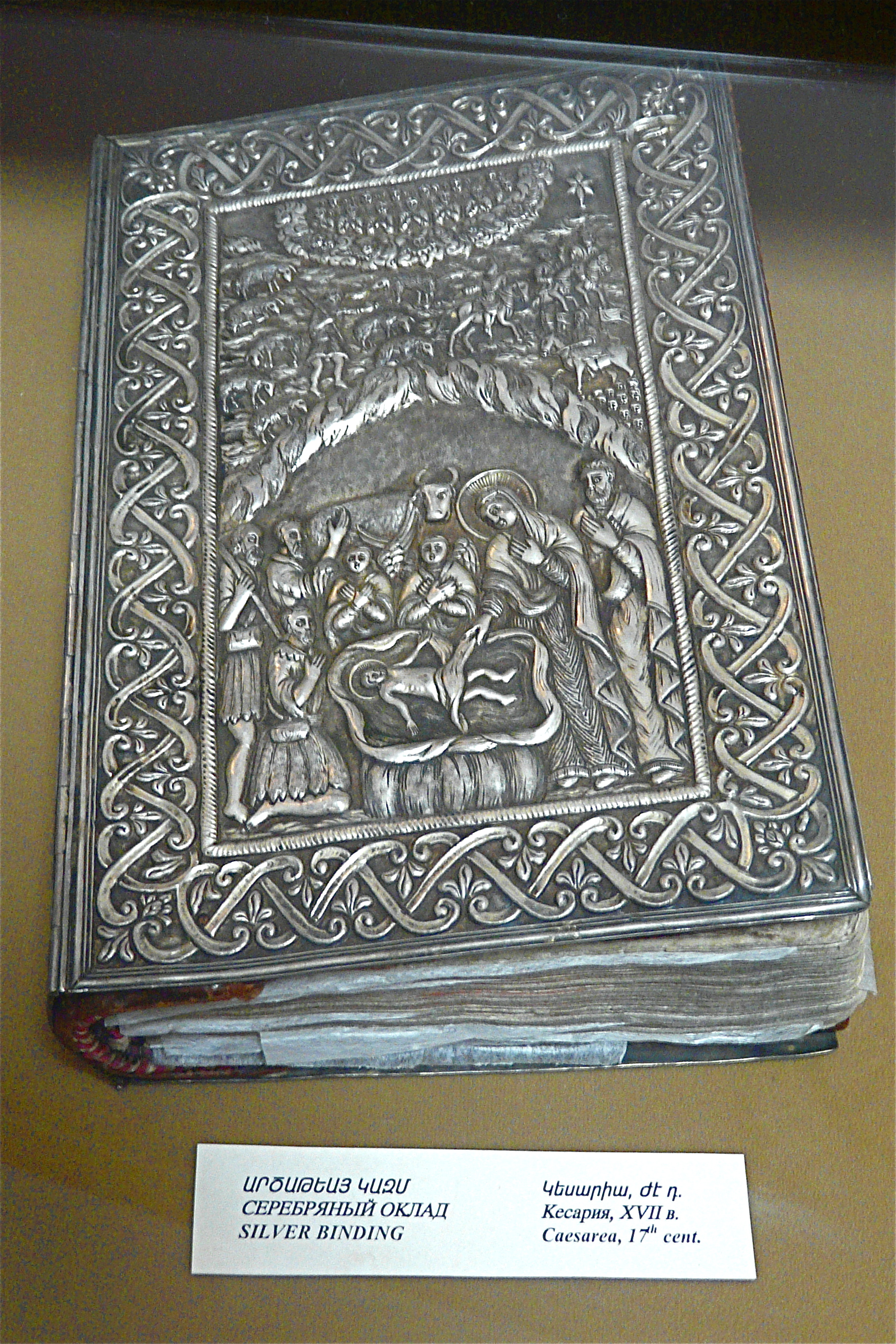 Matenadaran - Het manuscriptenmuseum. Voor het museum bevindt zich een standbeeld van Mesrop Mashtots, de ontwerper van het Armeens alfabet. Het museum herbergt 16000 oude en verlichte manuscripten. Het oudste "Het evangelie van Lazarus" uit 887. Het grootste: 34 kg wegend en gemaakt van 700 koeievellen en tevens het kleinste evangelie: 12 gram wegend en 3x4cm groot. Zie ook